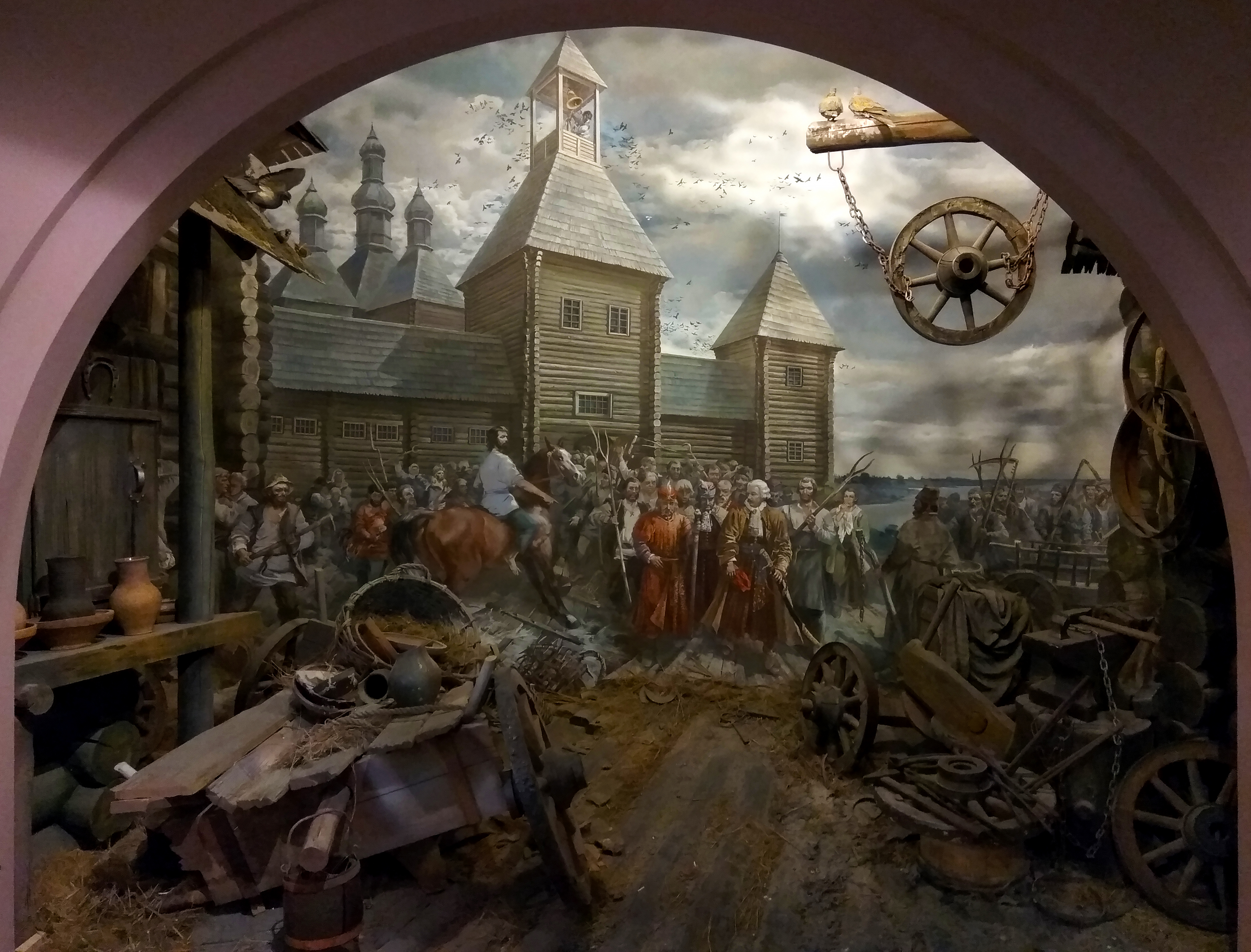 Магілёўскі абласны краязнаўчы музей. Дыярама. Паўстанне рамеснікаў у Магілёве 1606-1610